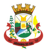 Brasão de Armas do município de Ariranha do Ivaí - PR - Brasil.